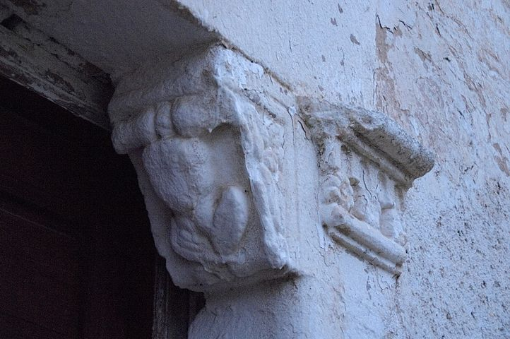 Detalle de la ménsula derecha presente en la portada principal. Se trata, al igual que en la ménsula izquierda, de una arpía con un marcado carácter apotropaico.